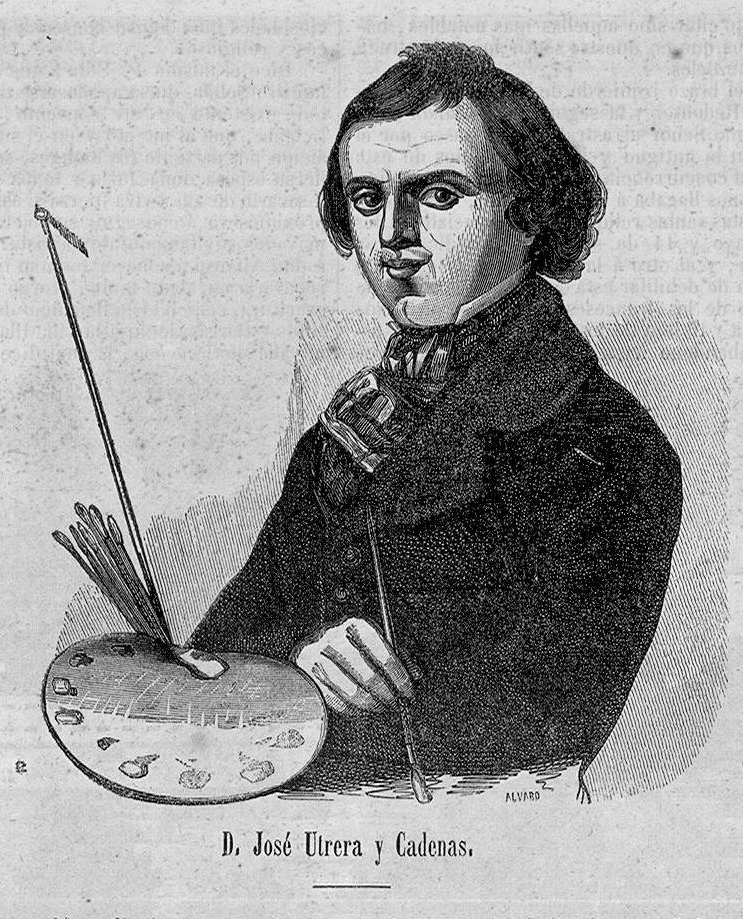 José Utrera y Cadenas.